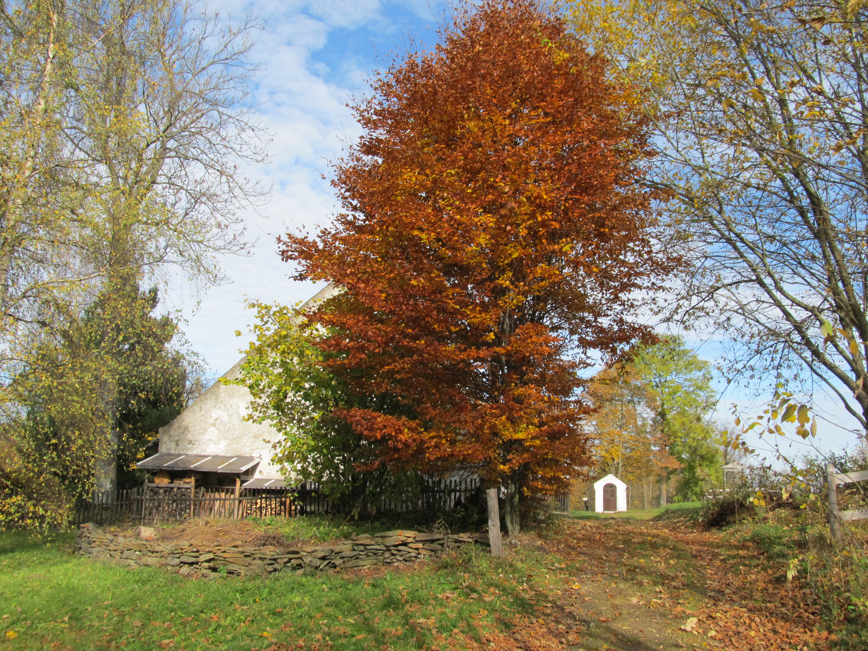 Jarkovice